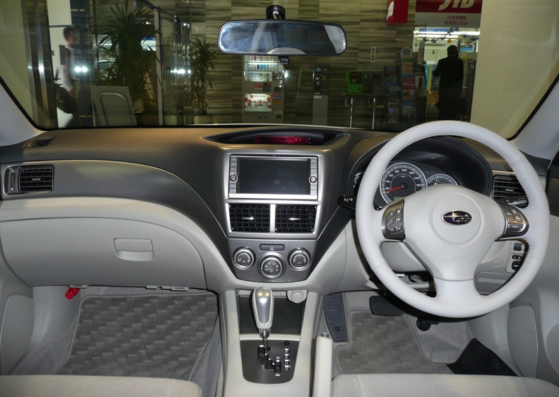 Subaru Impreza interior.